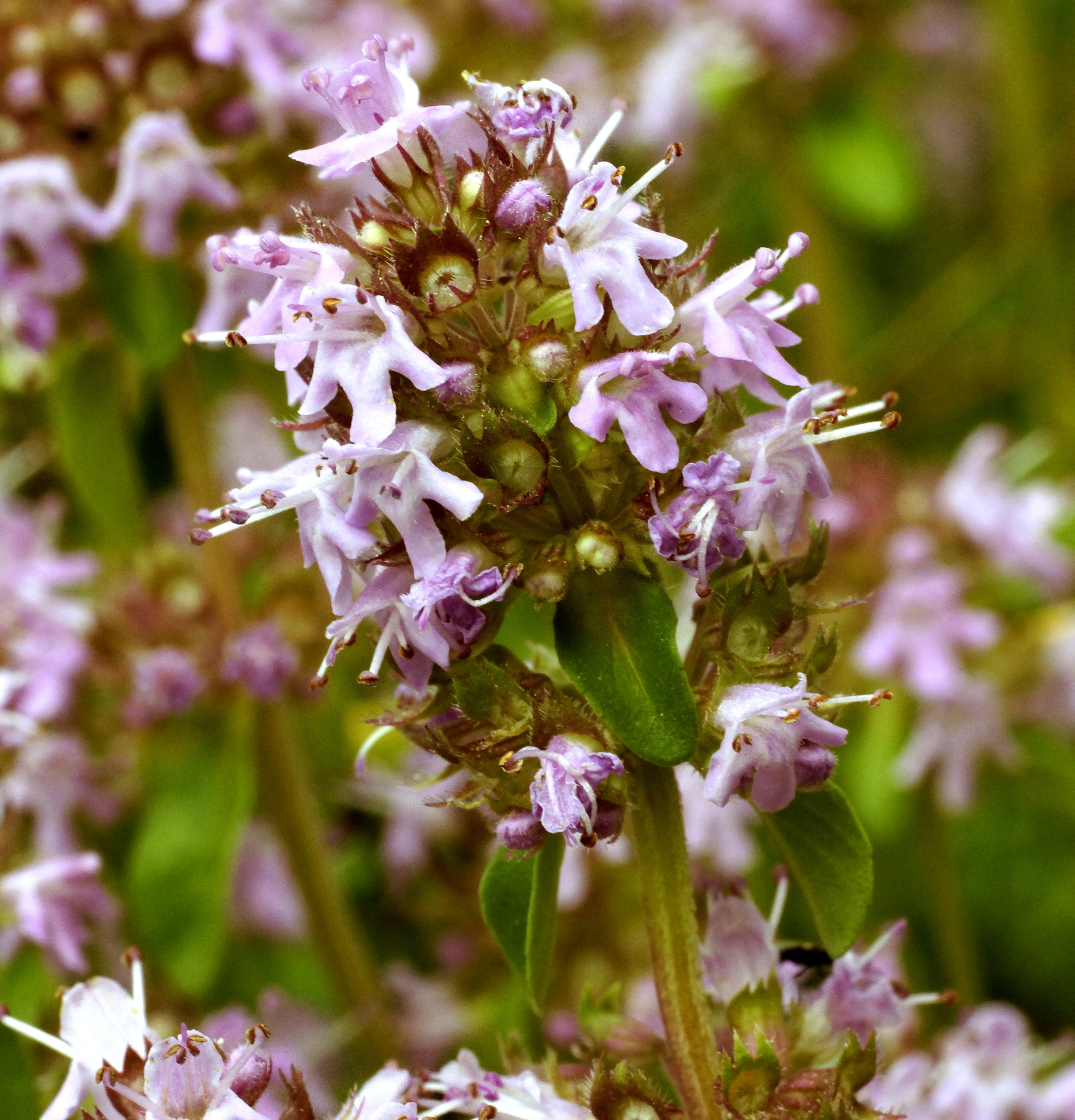 Arznei-Thymian, Lamiaceae, Deutschland, Bayern, Oberfranken, Selbitz